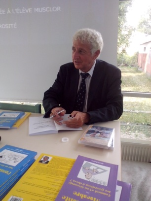 L'auteur de la constante macabre